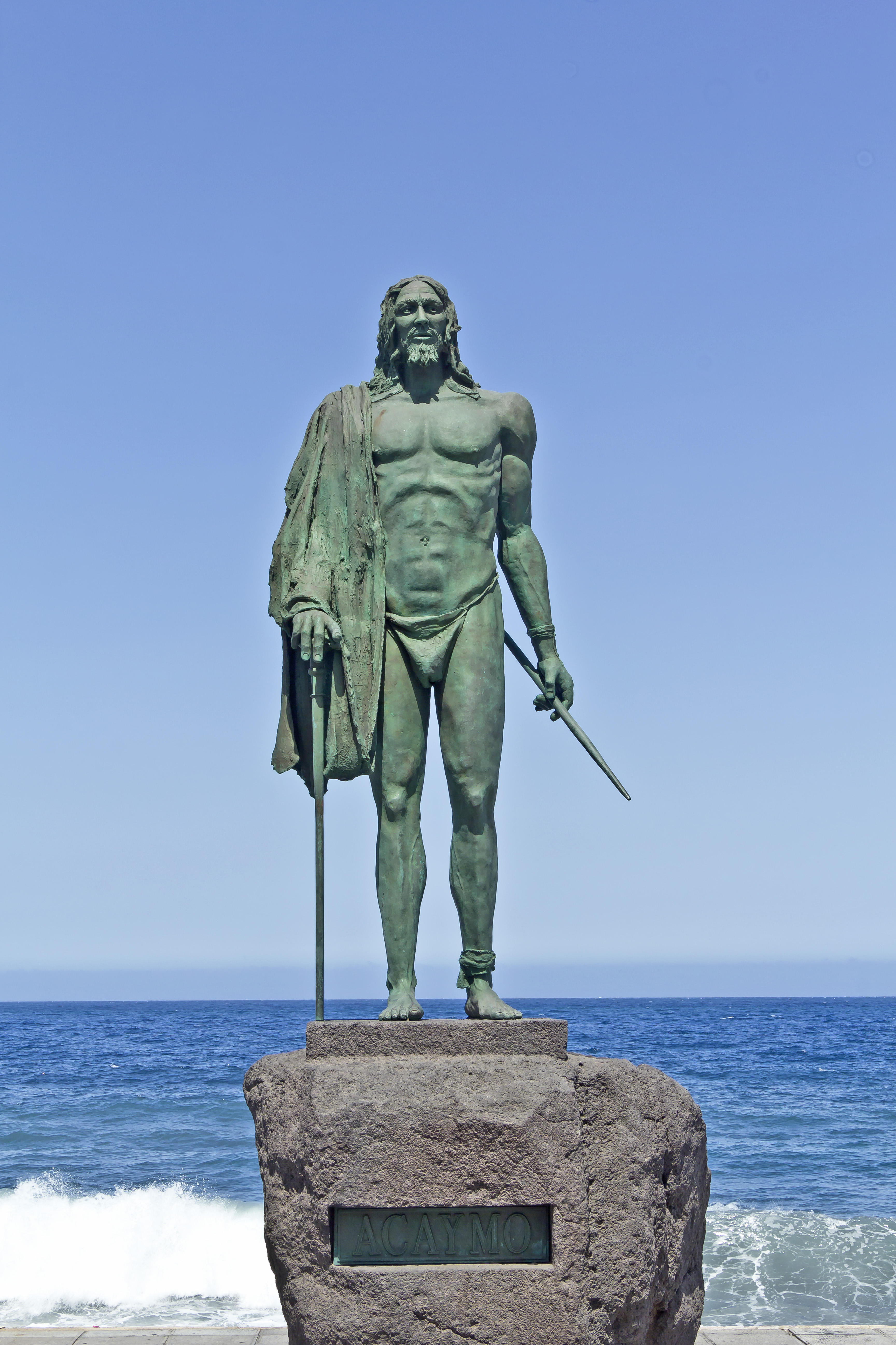 Die Plastik des Mencey Acaymo auf der Plaza de la Patrona de Canarias in Candelaria, Teneriffa, Spanien wurde von José Abad geschaffen.